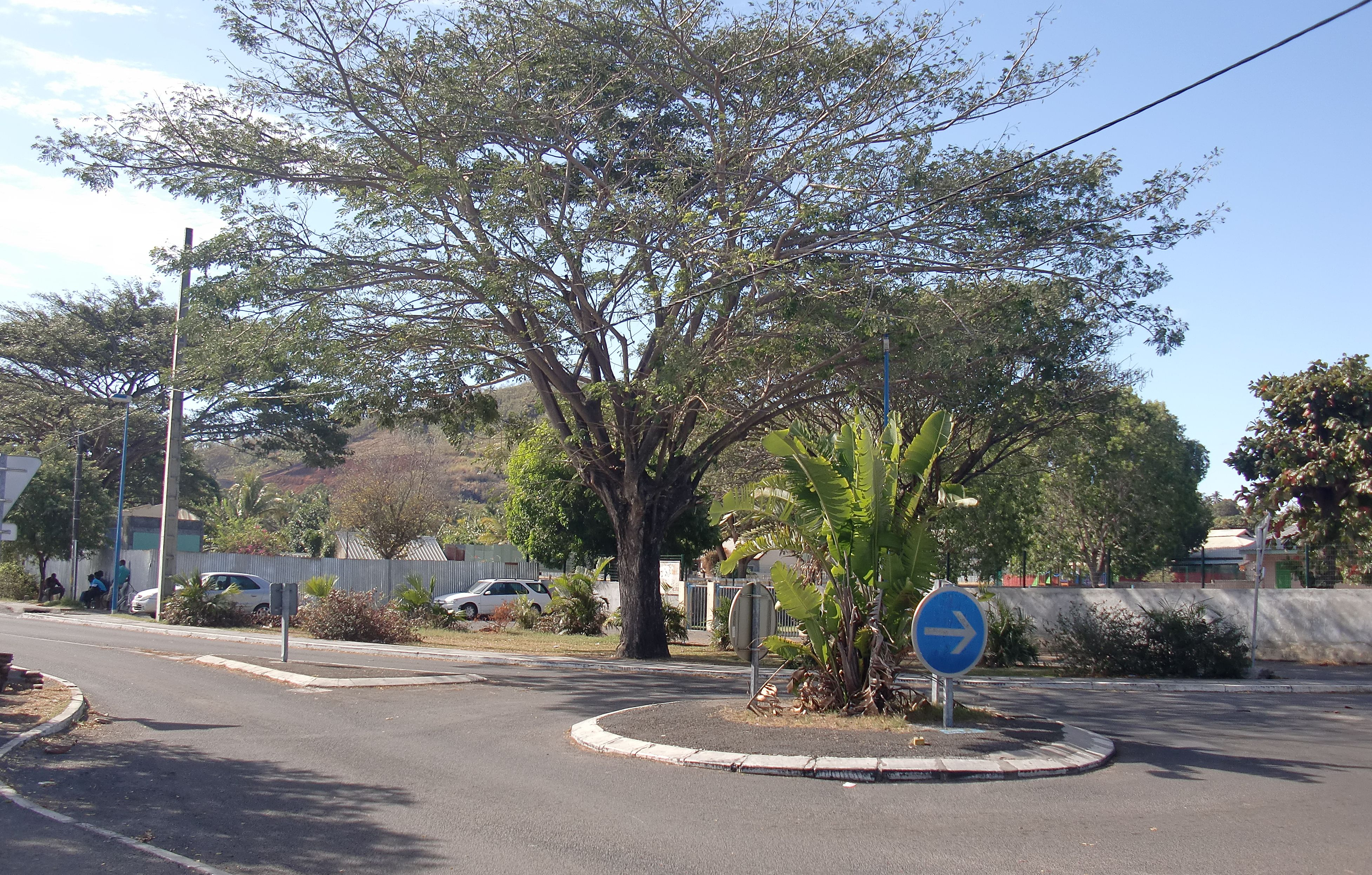 Photo prise au niveau du rond point AJP de Pamandzi. La journée. On y aperçois la place des congrès plus haut et l'école pamandzi 2 à gauche